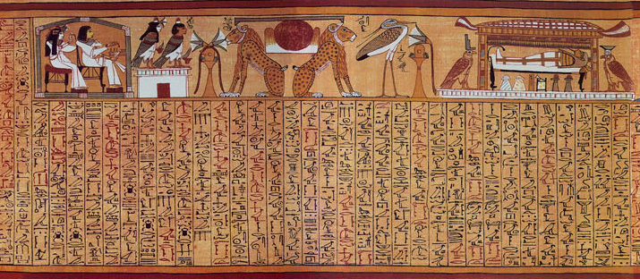 Partie du Papyrus d'Ani servant à illustrer le début du chapitre 17 du Livre des Morts